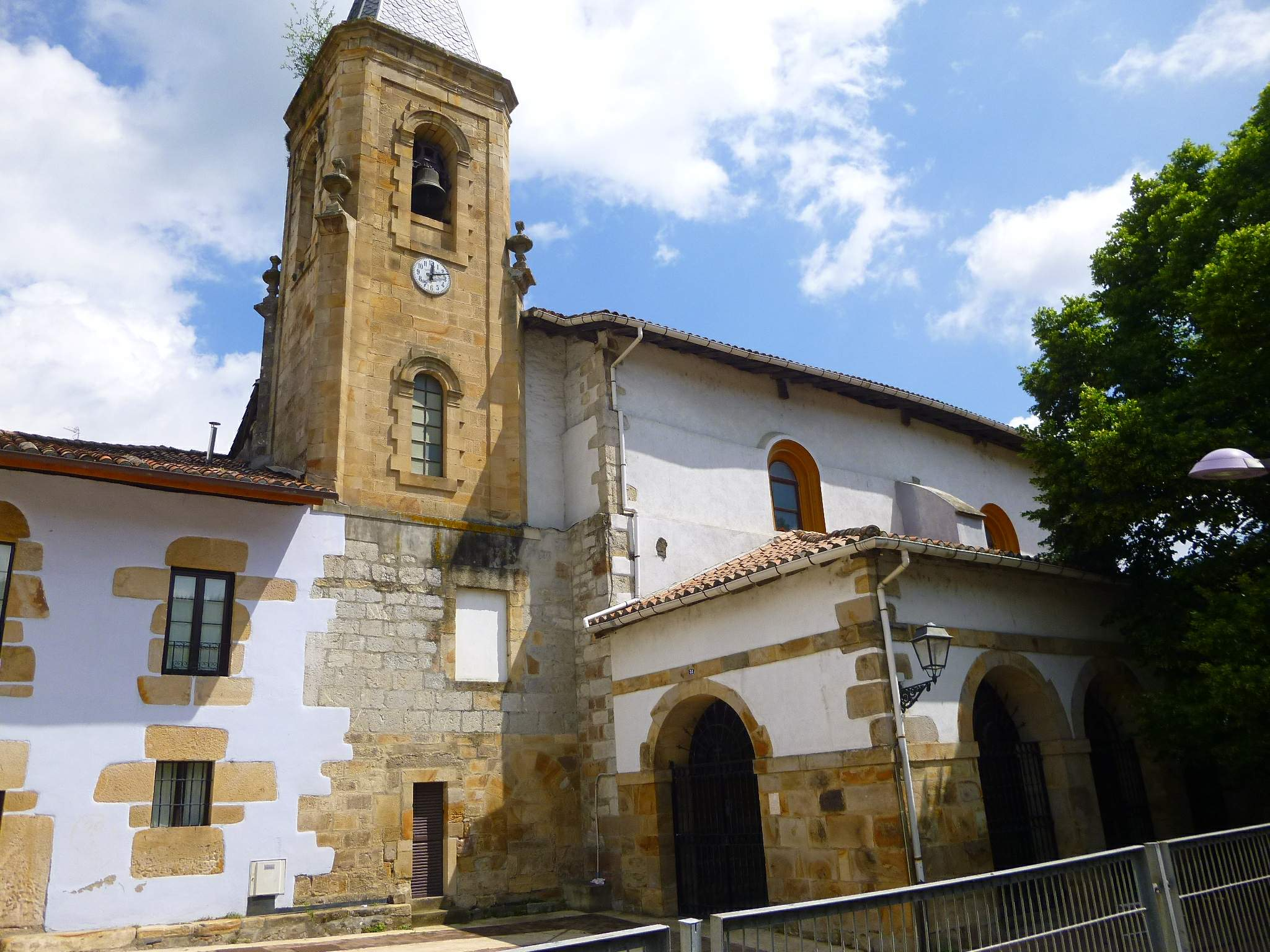 Iglesia de San Miguel de Uribarri (Arrasate/Mondragón, Gipuzkoa)